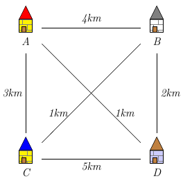 Instance du problème du voyageur de commerce